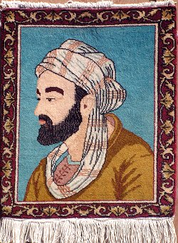 Foto van een Tabriz tapijt.